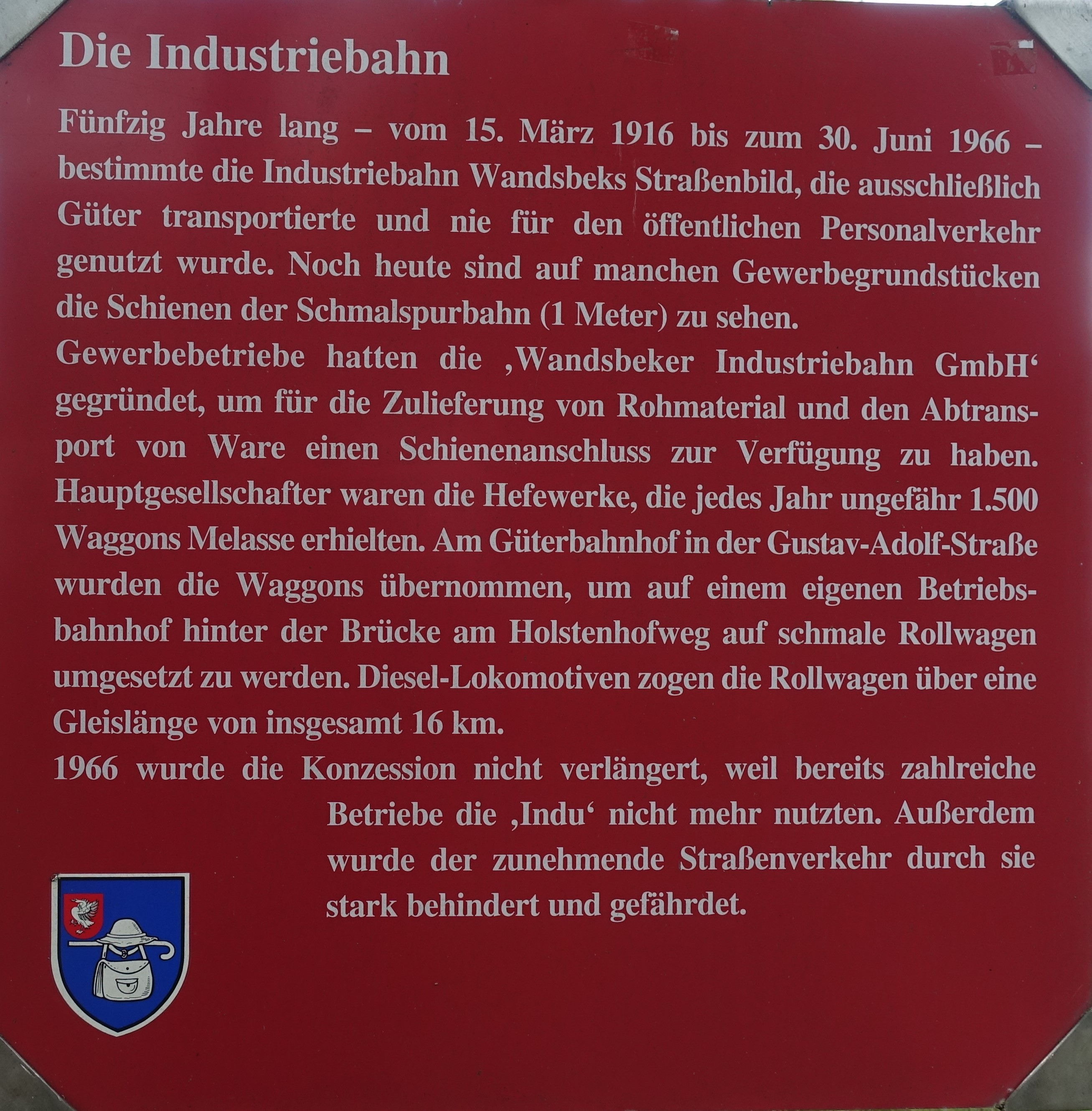 Geschichtstafel zur Industriebahn in Hamburg-Wandsbek vor der Hefefabrik Ohly